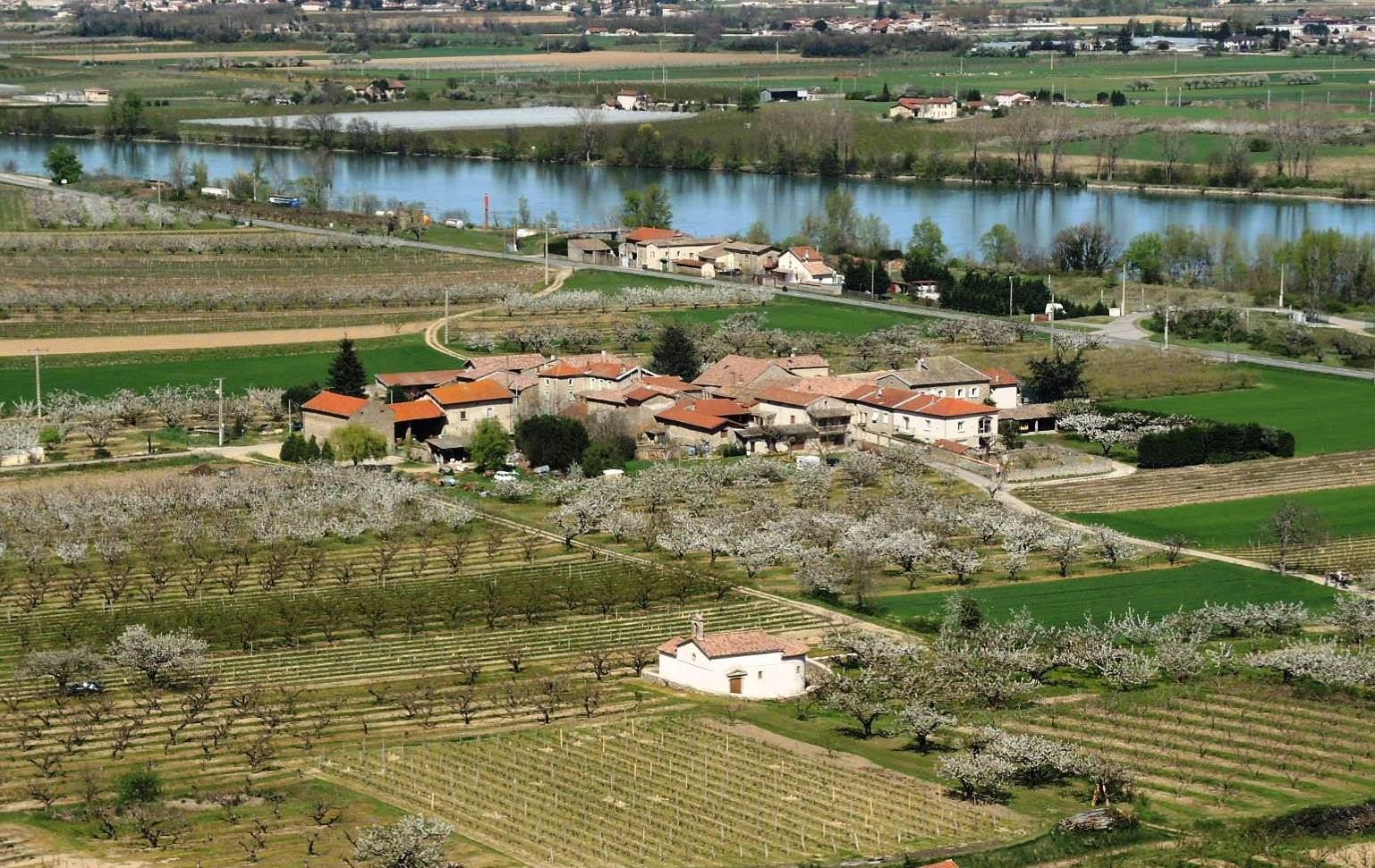 Andance vue générale et détails